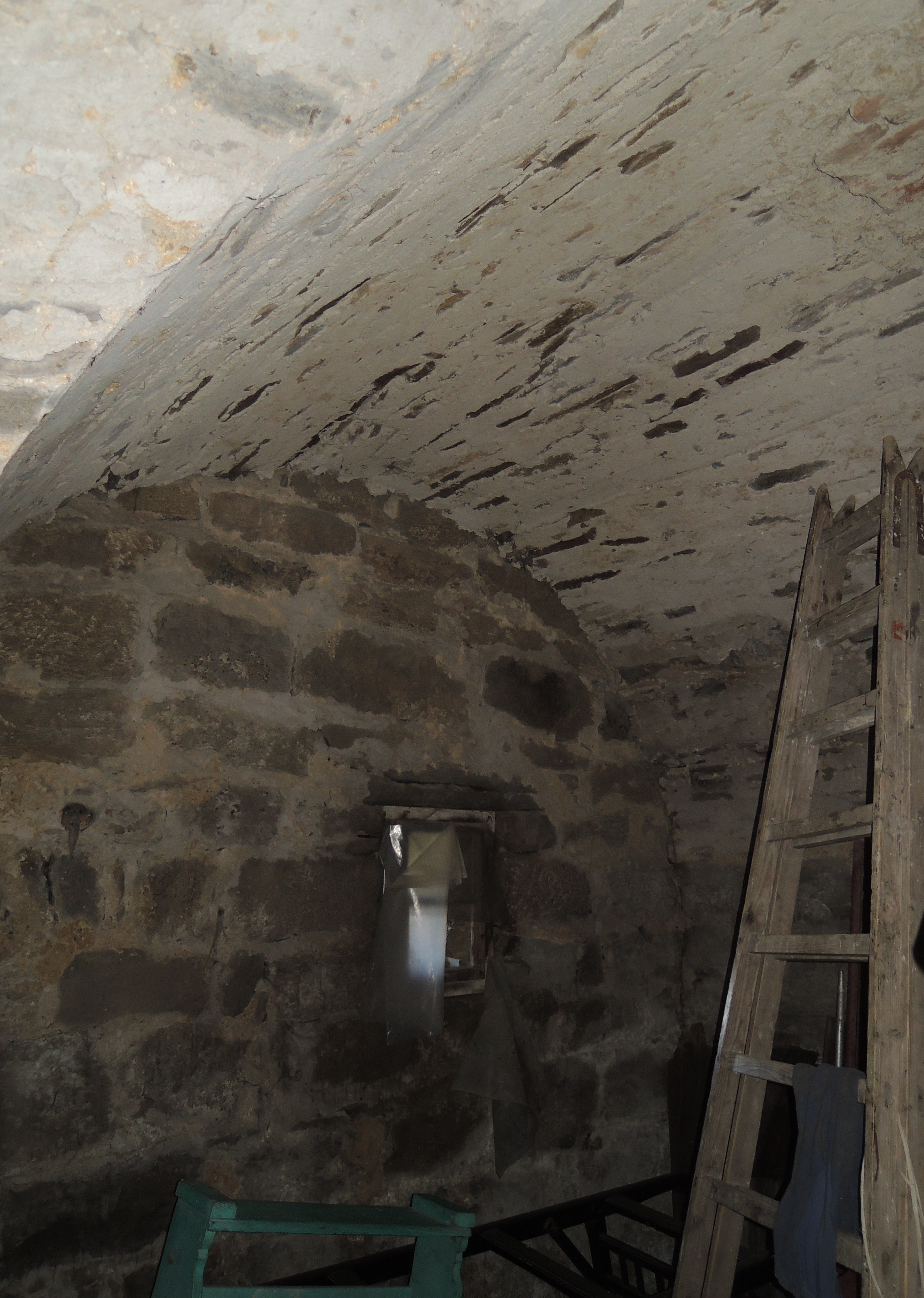 Klenba v přízemní kobce věže kostal sv. Václava, Chřenovice